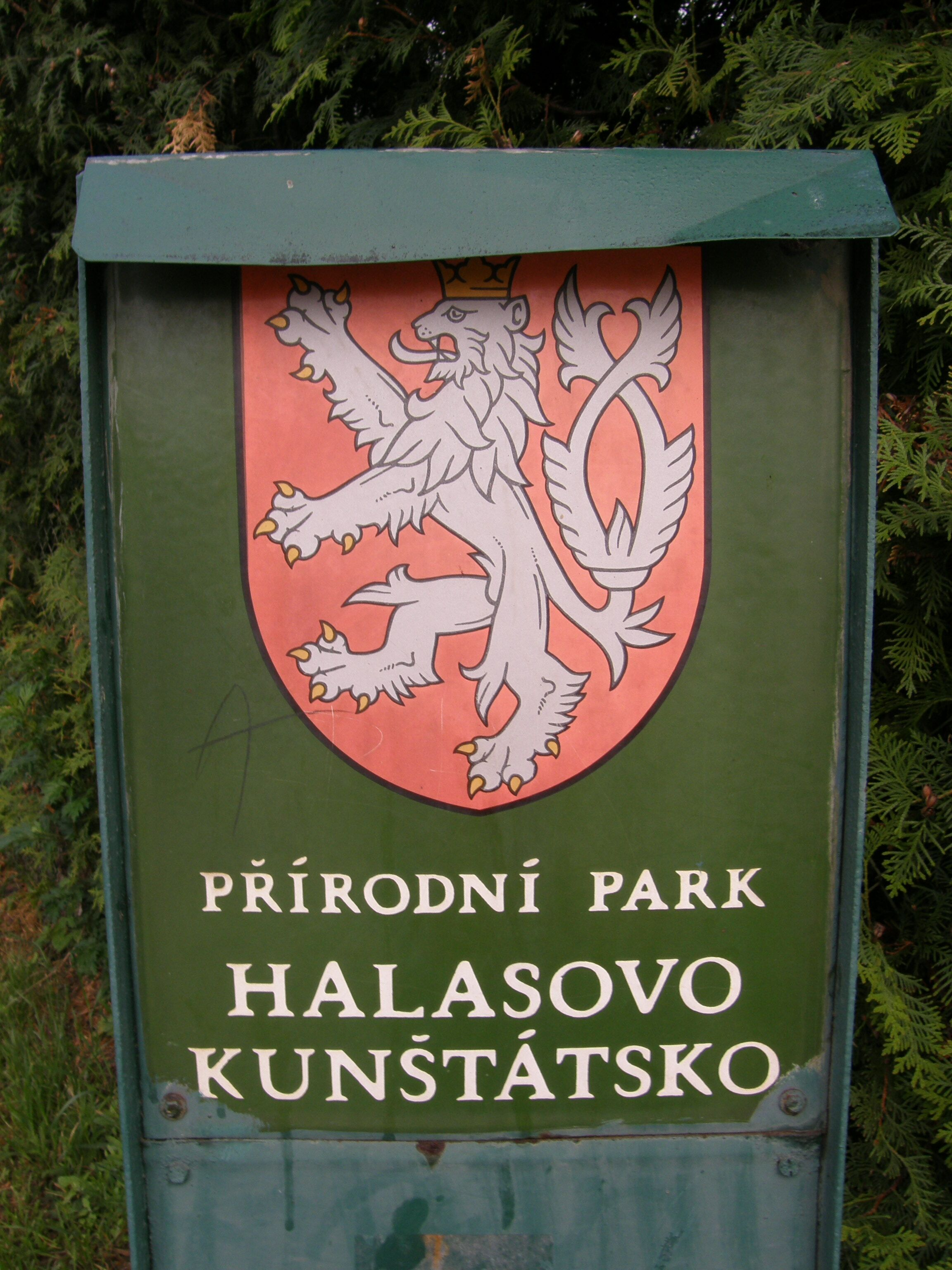 Prirodni park (Halasovo Kunstatsko)